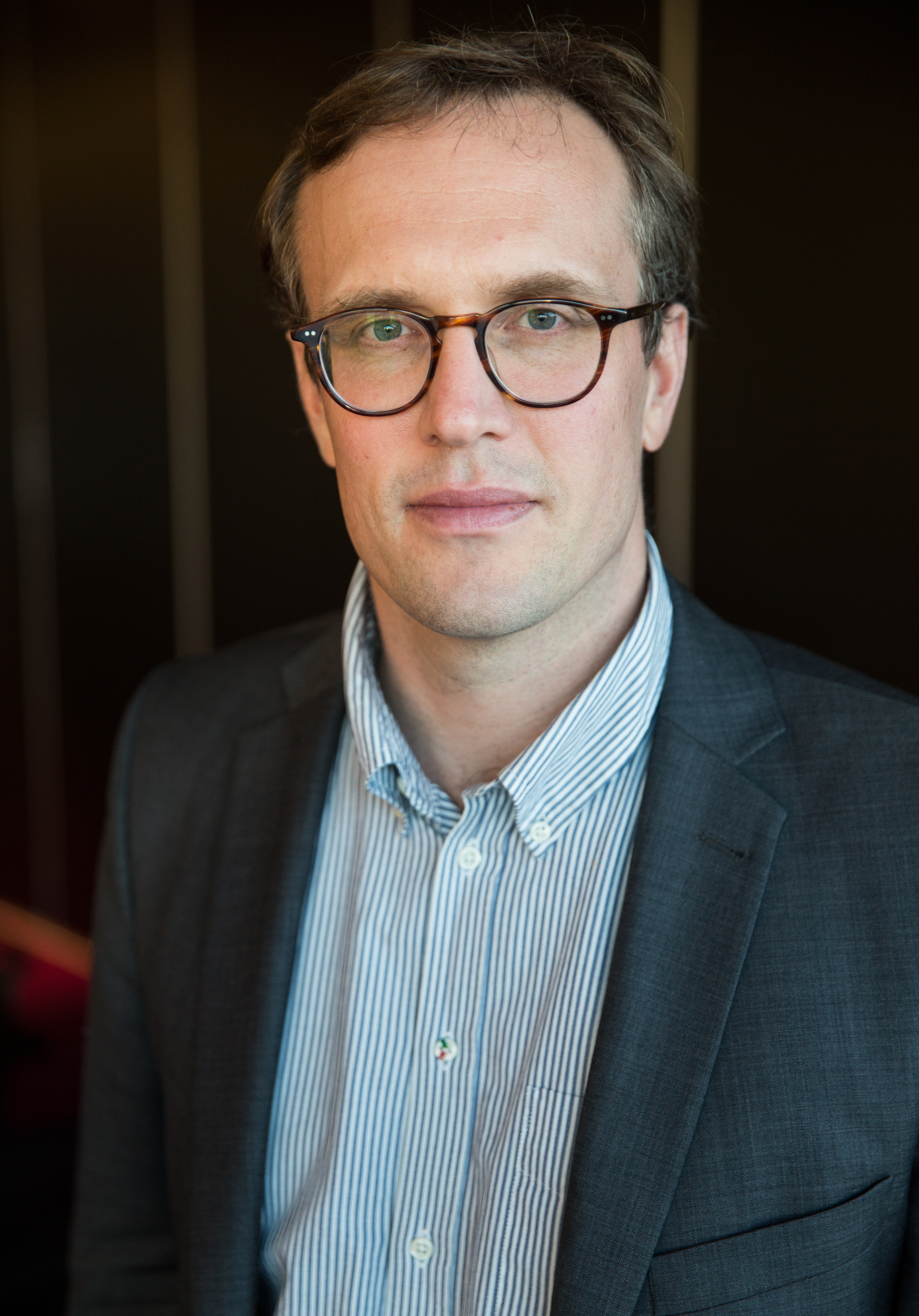 Journalisten och författaren Andreas Cervenka.